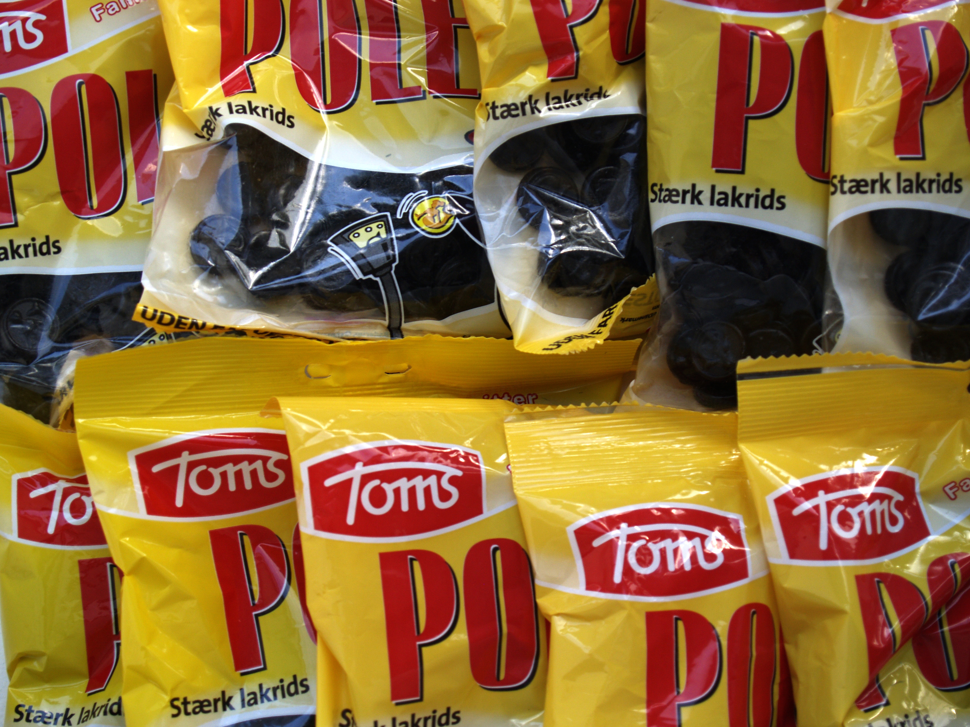 Poletter